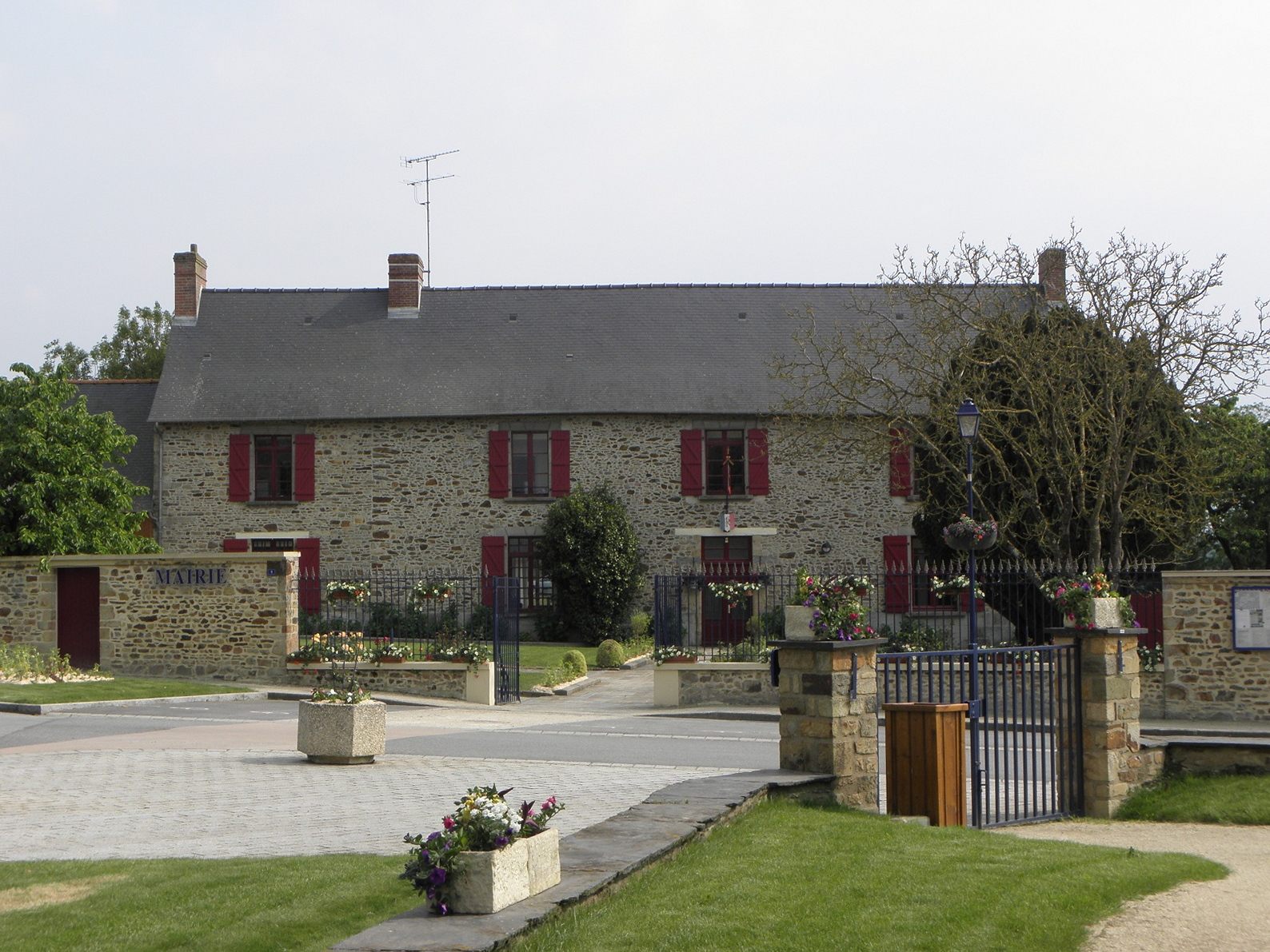 Mairie de Moutiers (35).